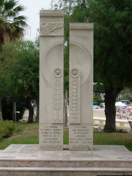 Monument situé sur La Croisette à Cannes, au jardin d’Arménie, dédiée à la mémoire des victimes du Génocide arménien de 1915. Le monument est l'oeuvre d'Albert Mkhitarian.